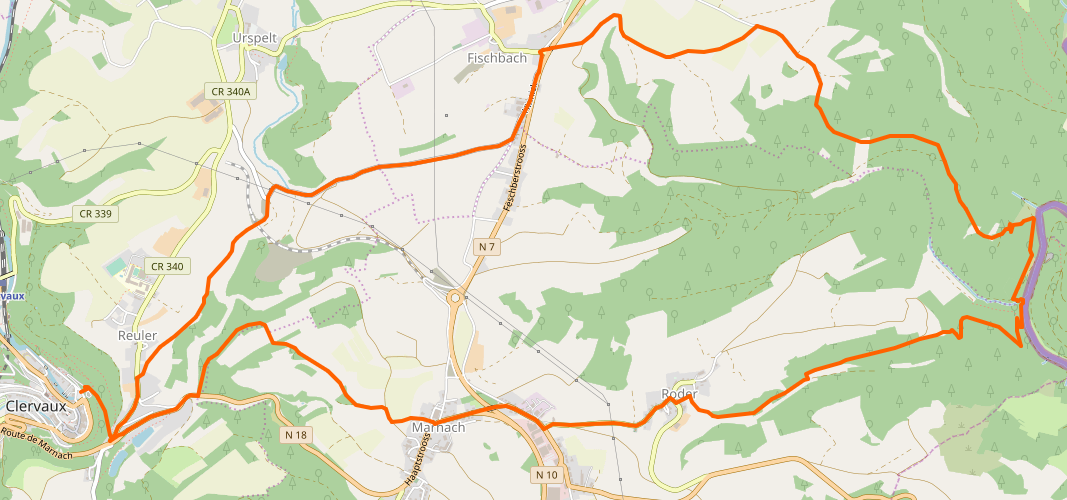 Streck vum Klierf-Our-Pad